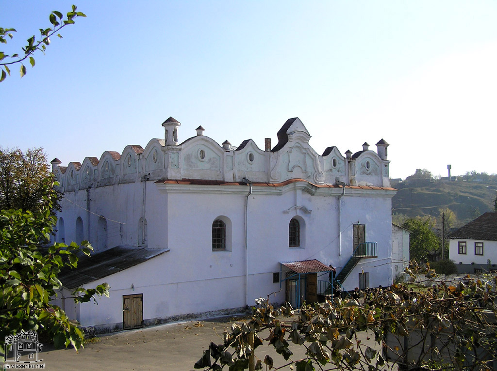 Синагога в Шаргороді: Синагога в Шаргороді